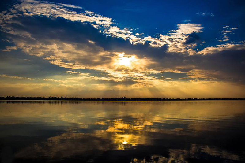 وادي النطرون